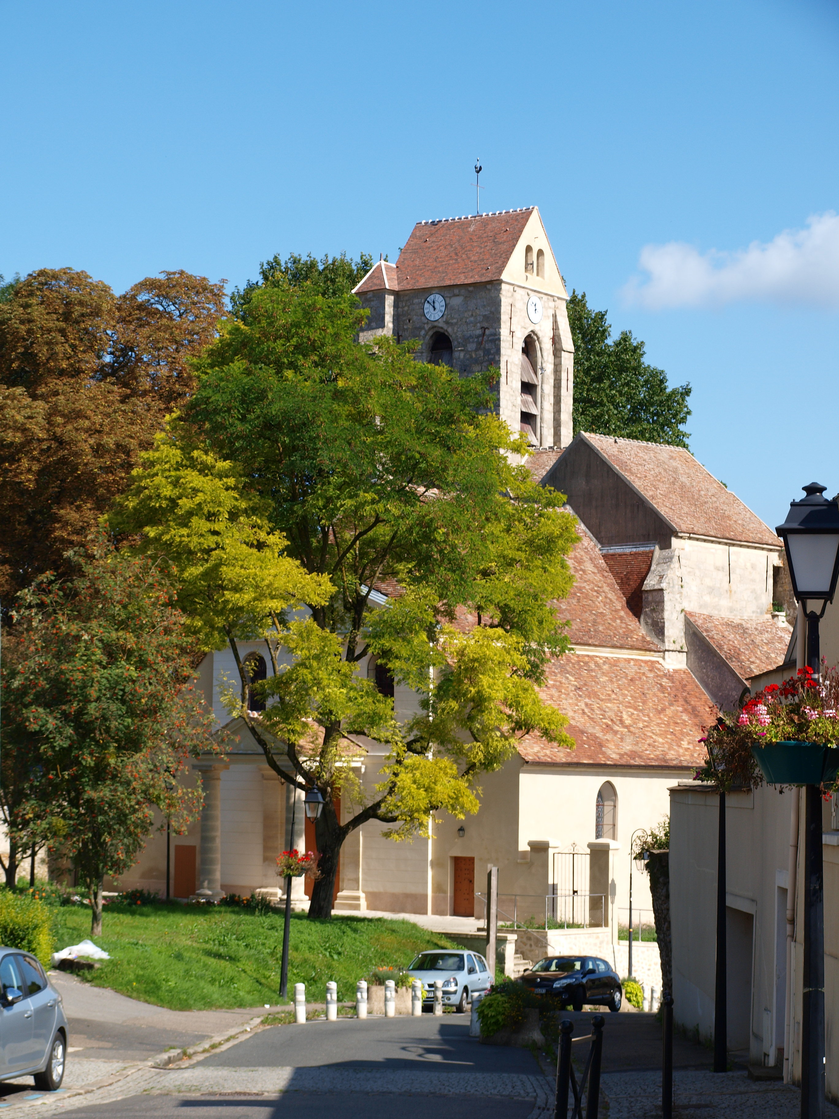 Servon (Seine'et-Marne) ; église Saint-Louis